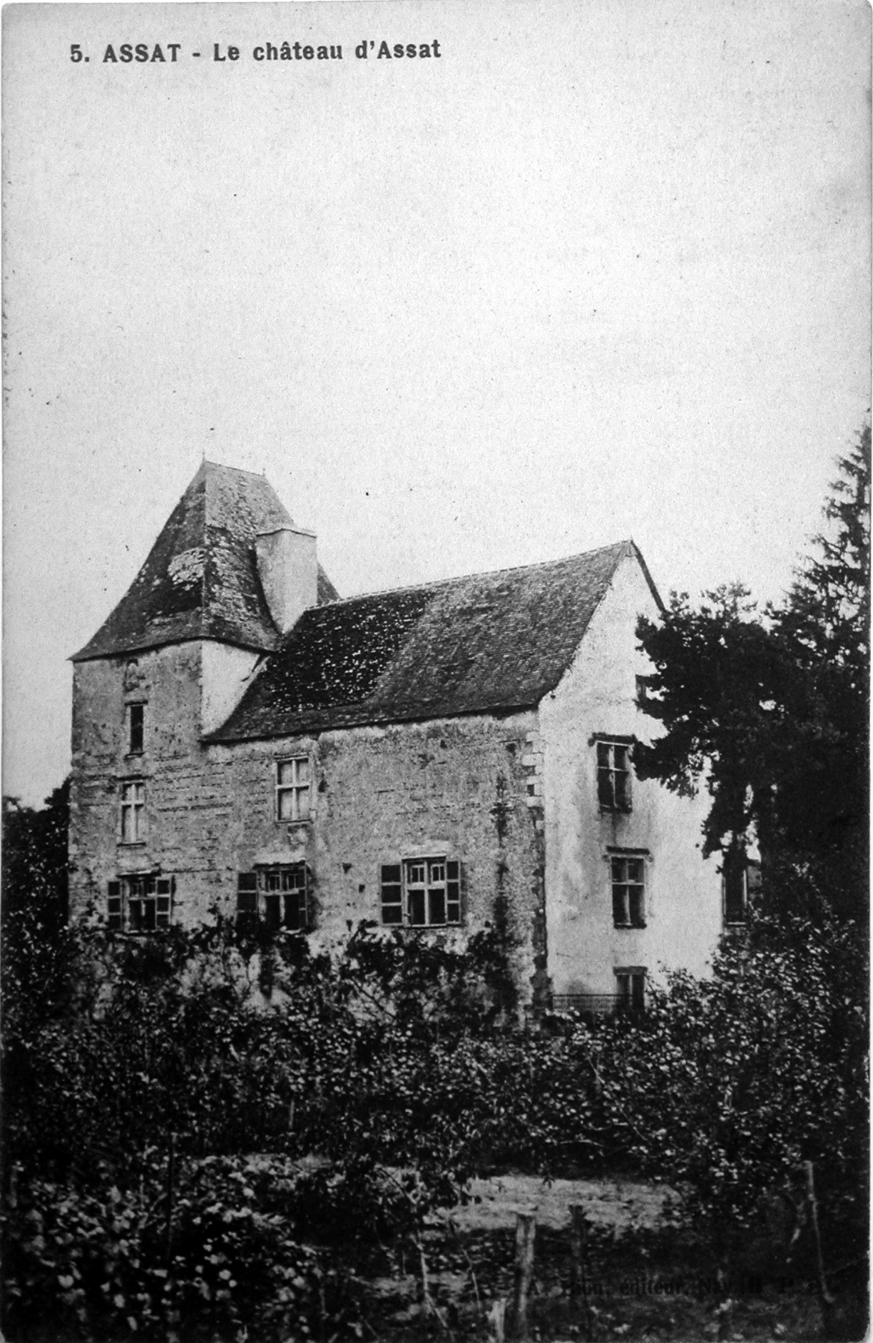 Château d'Assat, Pyrénées-Atlantiques, France